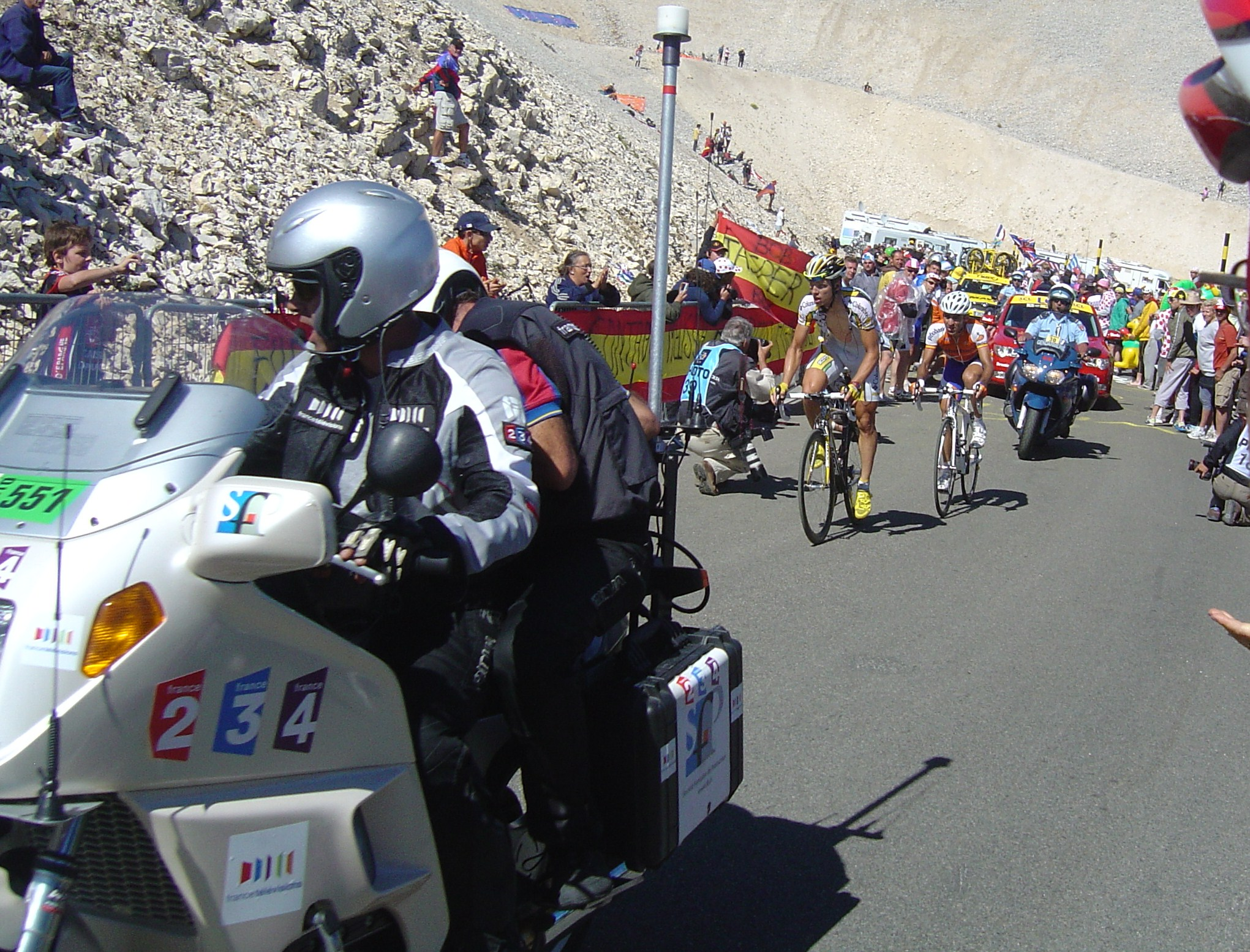 Tony Martin et Juan-Manuel Garate en tête de la 20e étape du Tour de France 2009